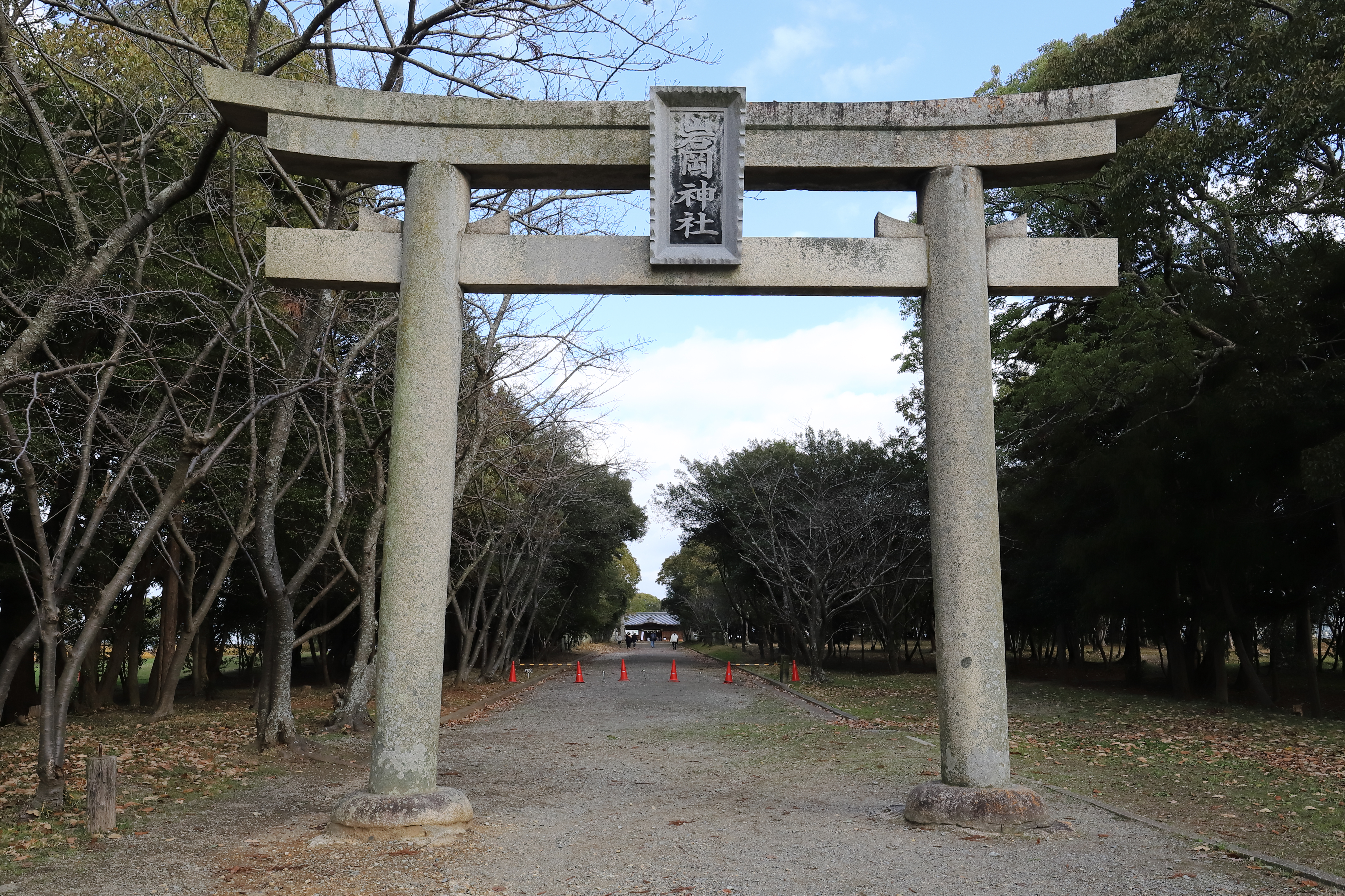 岩岡神社 鳥居から拝殿を望む Canon EOS 6D Mark II